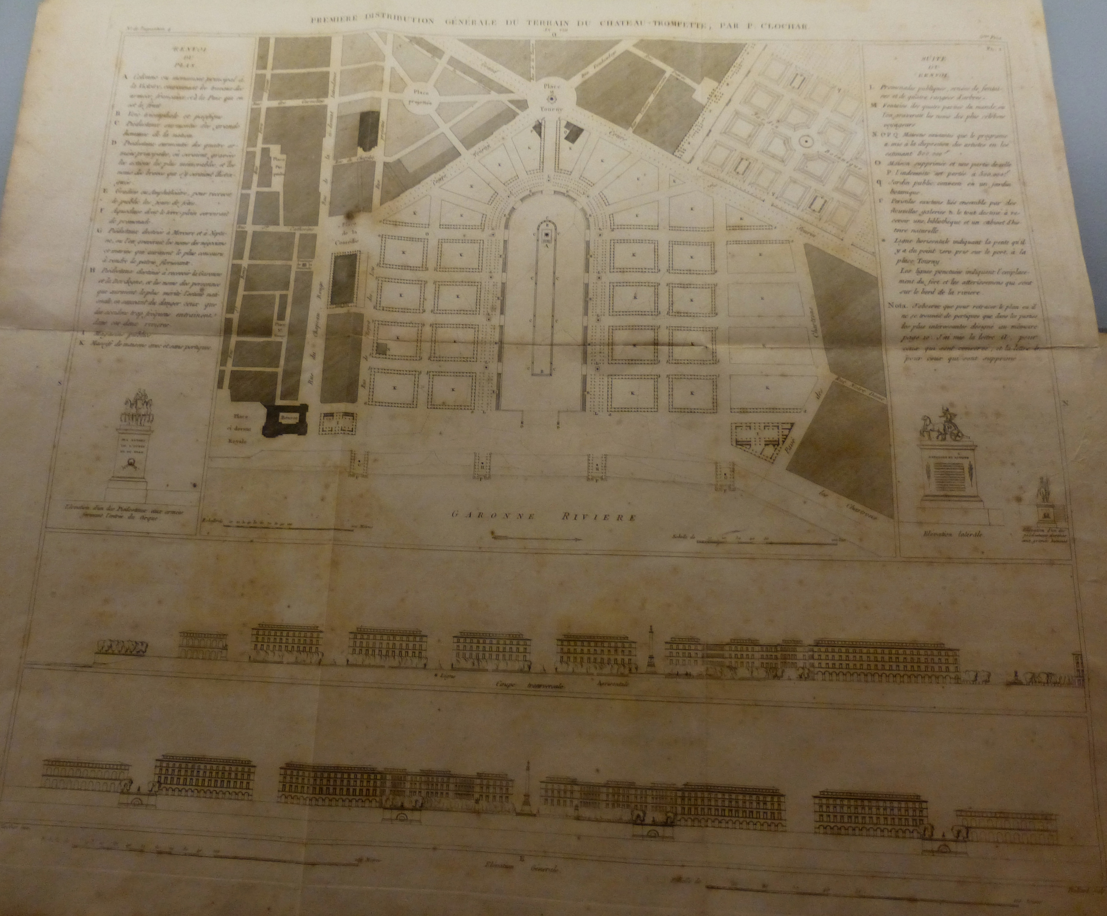 Bordeaux, Archives départementales de la Gironde, exposition Variation ː plan du site du Château Trompette, 1801.